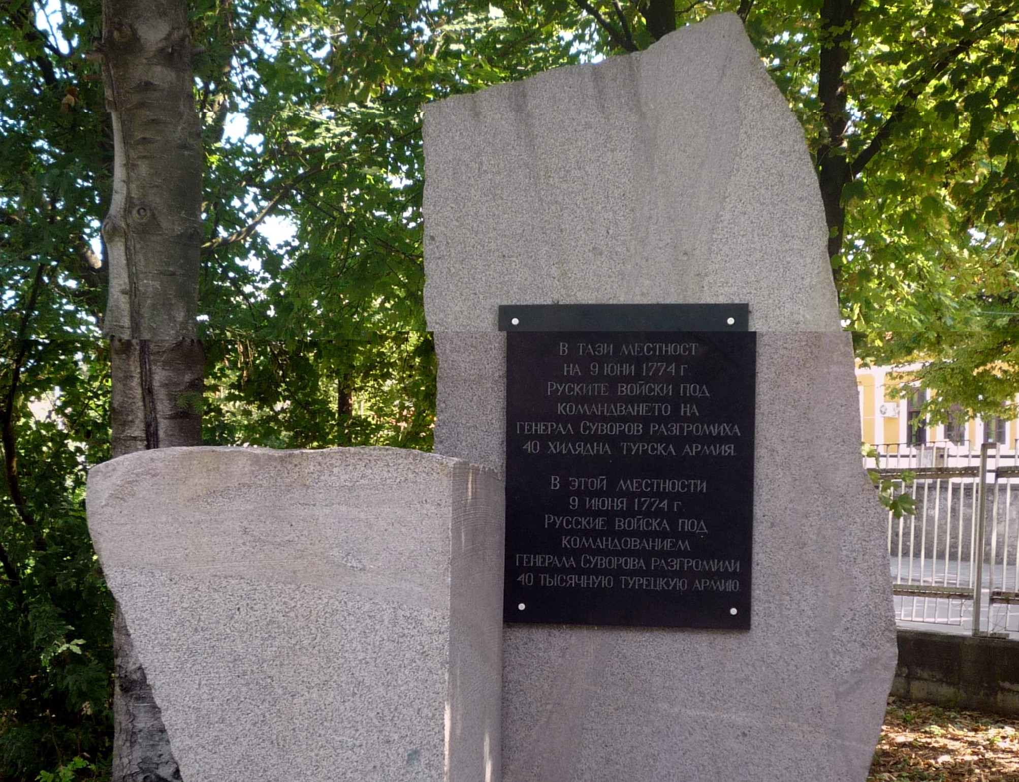 Нов паметник на загиналите на 21 юни 1774 г. руски войни в Руско-турската война 1768-1774 г. при с. Козлуджа (днес Суворово)